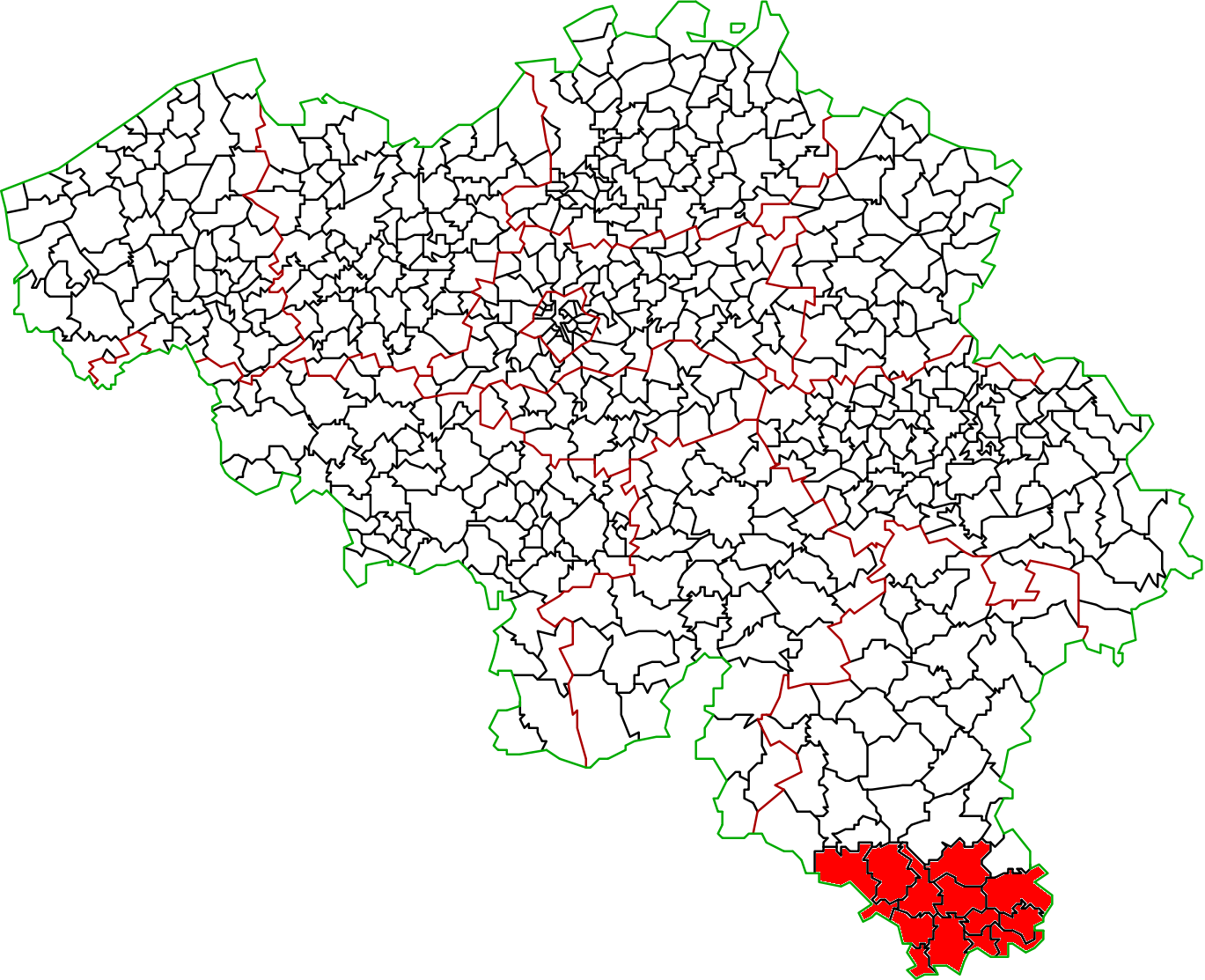 En rouge les communes dont au moins une partie fait partie du périmètre défini par le ministère fédéral de l'agriculture et dans lequel des cas de peste porcine africaine ont été recensés. Réalisé à partir du fichier